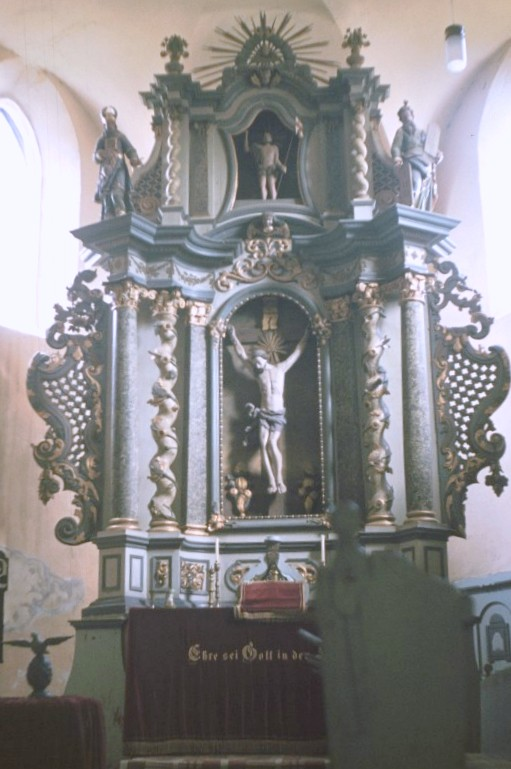 Kirchenburg Arkeden Philippi Altar (Archita)